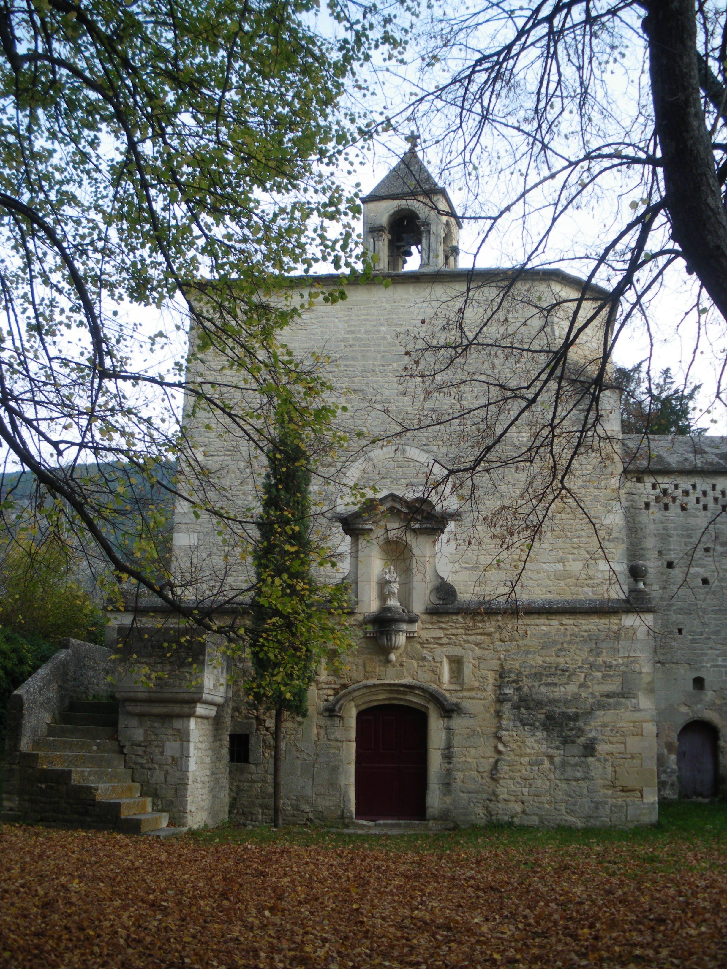 Notre Dame du Groseau, Malaucène, Vaucluse, France